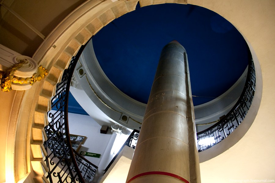 Баллистическая ракета Р-11М класса "земля-земля", принятая на вооружение в 1958 году. Военно-исторический музей, Самара, Россия